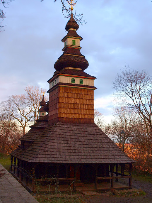 Kostel sv. Michala na Petříně